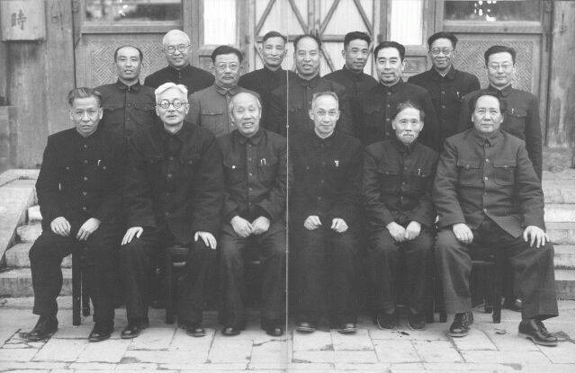 1949年，出席政协第一届全国委员会会议的中共代表在中南海合影.前排右起：毛泽东、徐特立、吴玉章、董必武、林伯渠、刘少奇；后排右起：齐燕铭、陆定一、周恩来、邢西萍、彭真、陈云、李克农、刘澜涛、安子文。